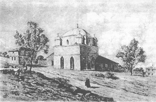 Turbe Mosque in Belgrade (now do not exist).